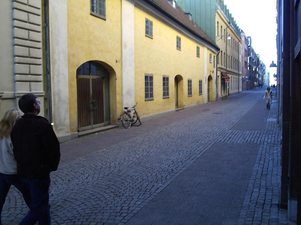 Postgatan i Göteborg, den 19 december 2004. En bild tagen av Harri Blomberg.